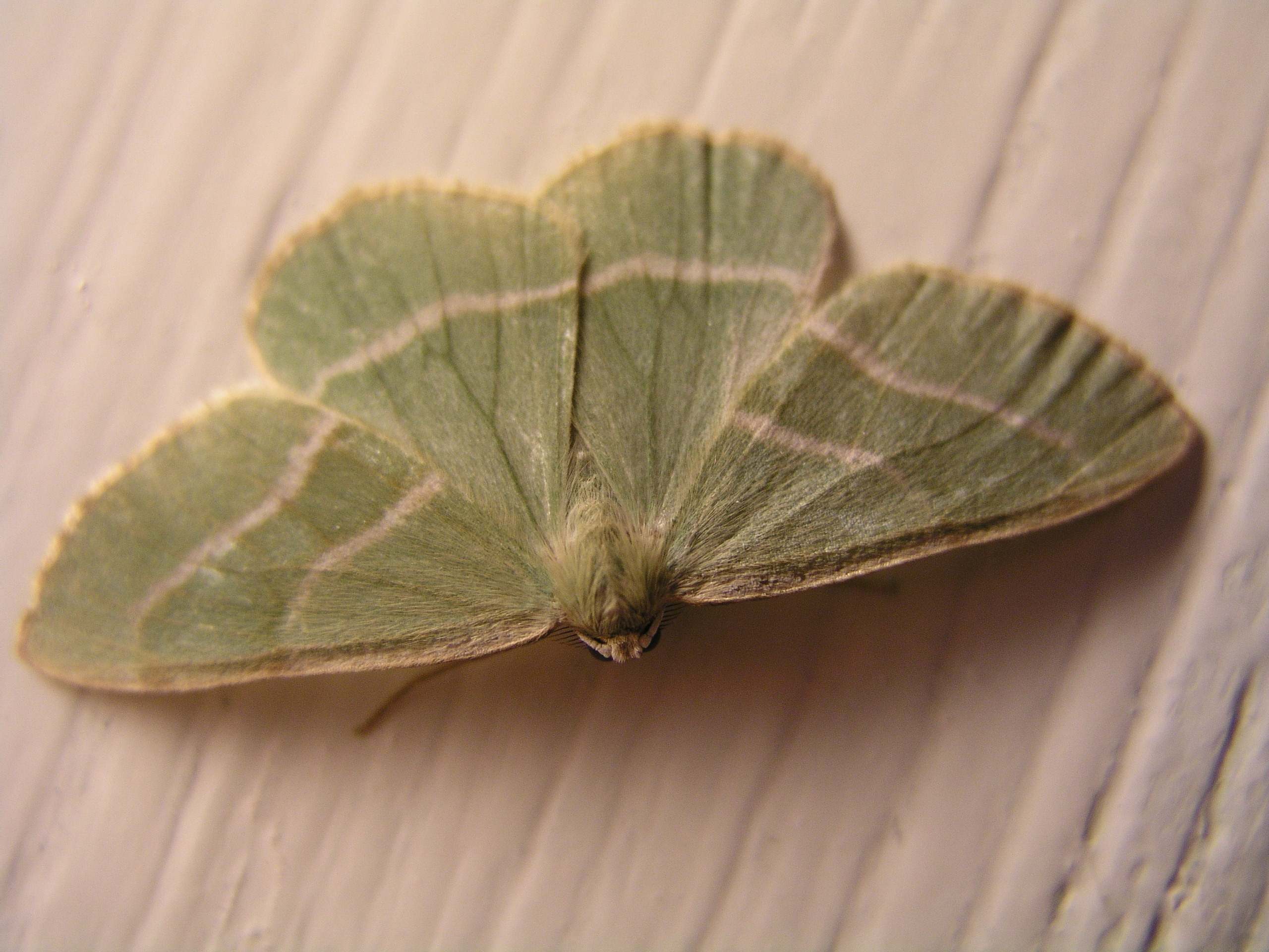 eigen werk, veluwe, 2006